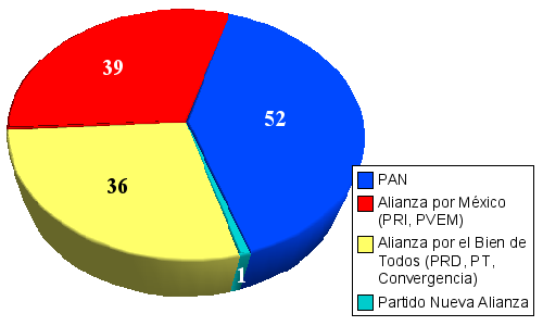 Composición del Senado de la República de la LX Legislatura del Congreso de la Unión de México, de acuerdo a los resultados del conteo distrital de la elección de 2006.